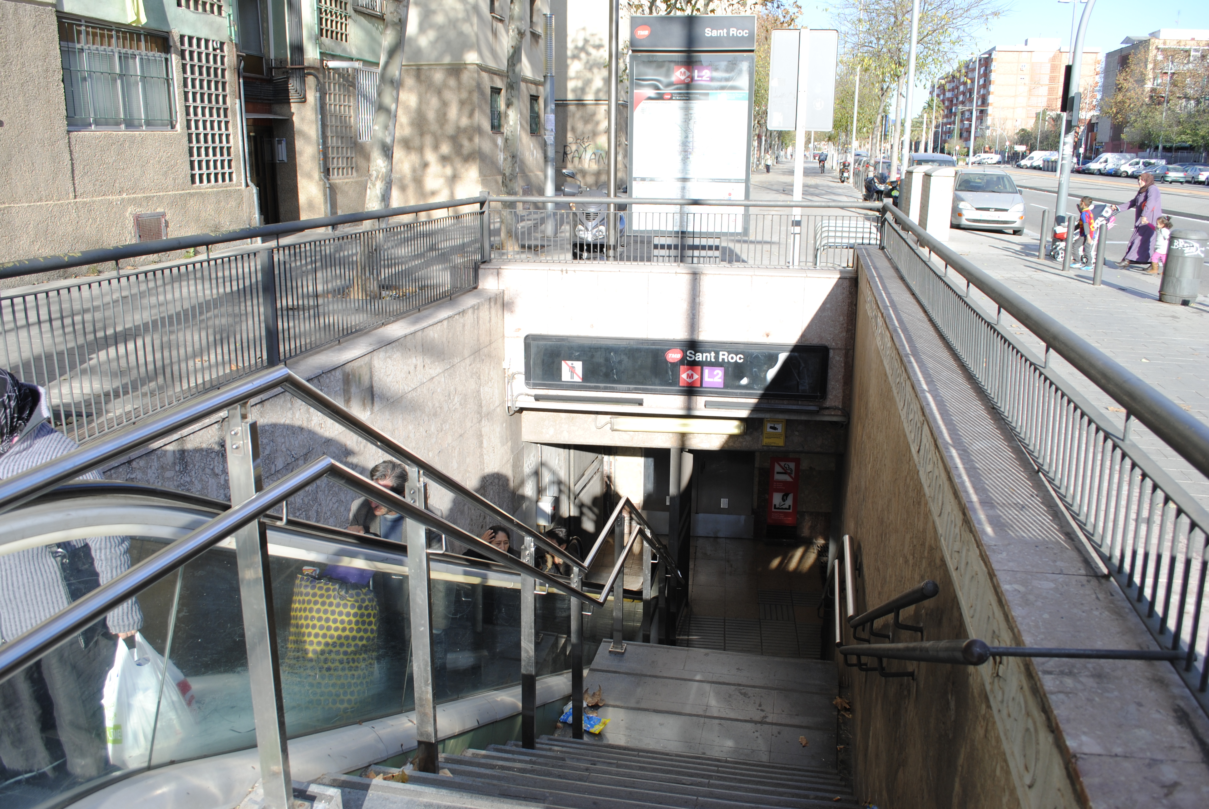 Boca del metro de l'estació de la L2 Sant Roc